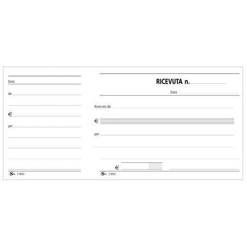 Scansione di un modulo di ricevuta